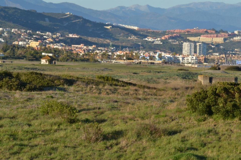 Presión urbanistica sobre guadalquiton